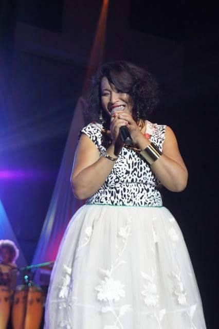 Malagasy: Fankalazana ny faha-25 taona niakarany antsehatra - Palais des Sports MAHAMASINA 2015